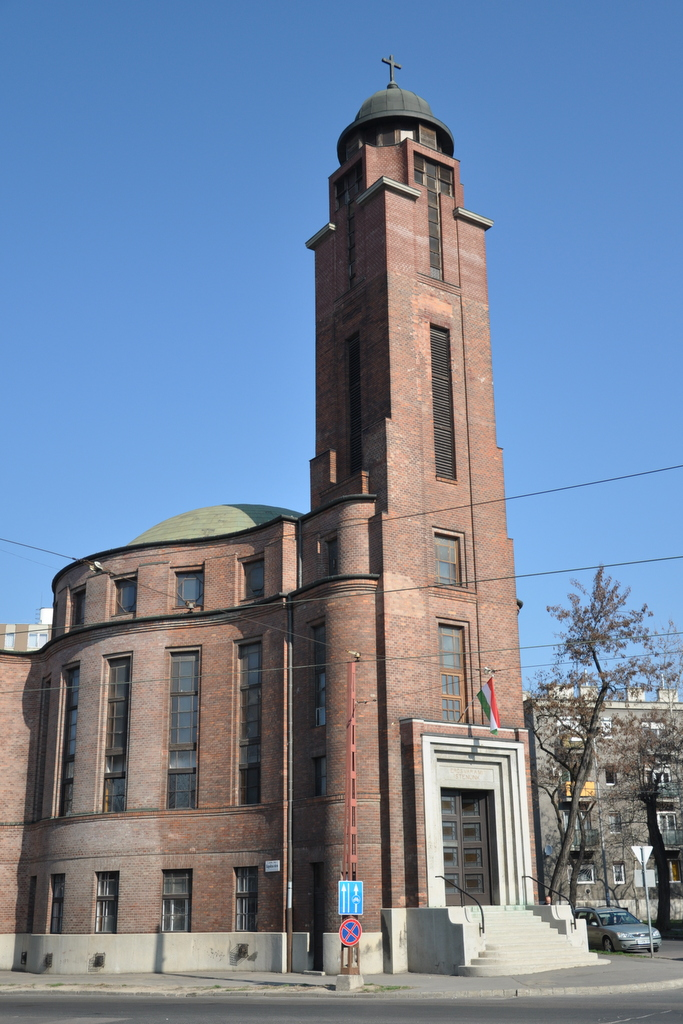 Evangelical-Lutheran church in Kápolna street, Budapest District X